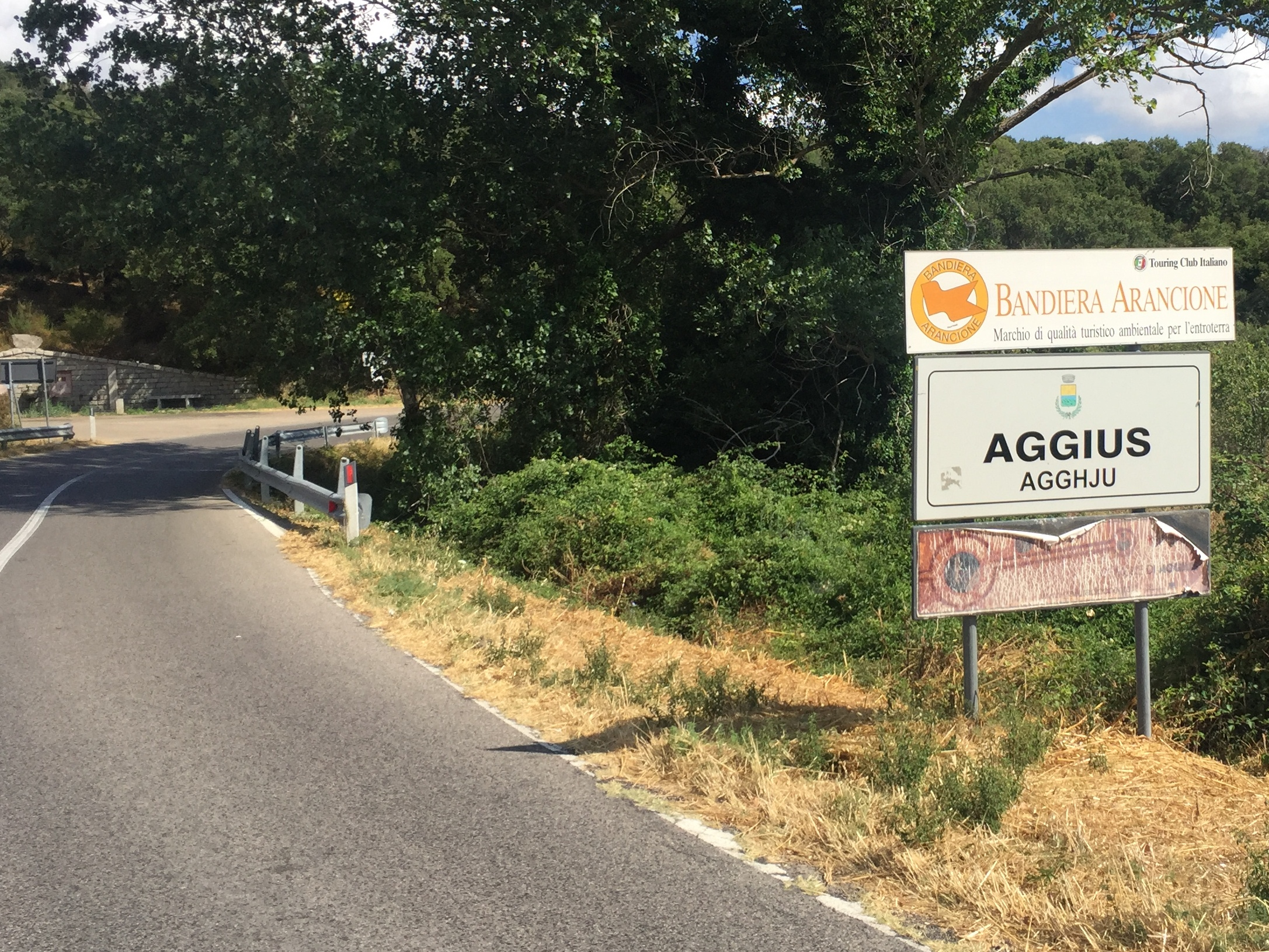 Panneau bilingue d'entrée dans Aggius (Sardaigne) et panneau banderia arancione en juillet 2016.